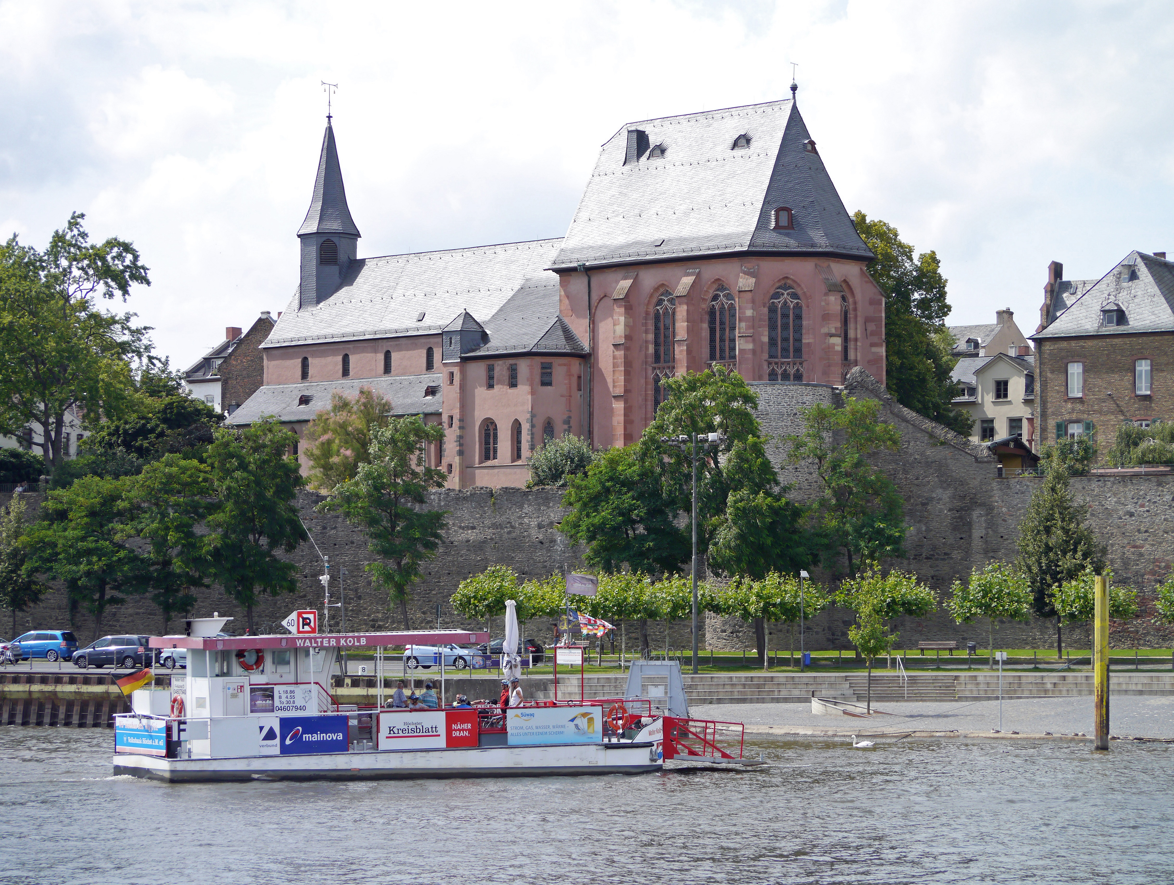 Die Hoechster Faehre (2012) auf dem Weg an das Hoechster Ufer. 2012 in Frankfurt am Main.